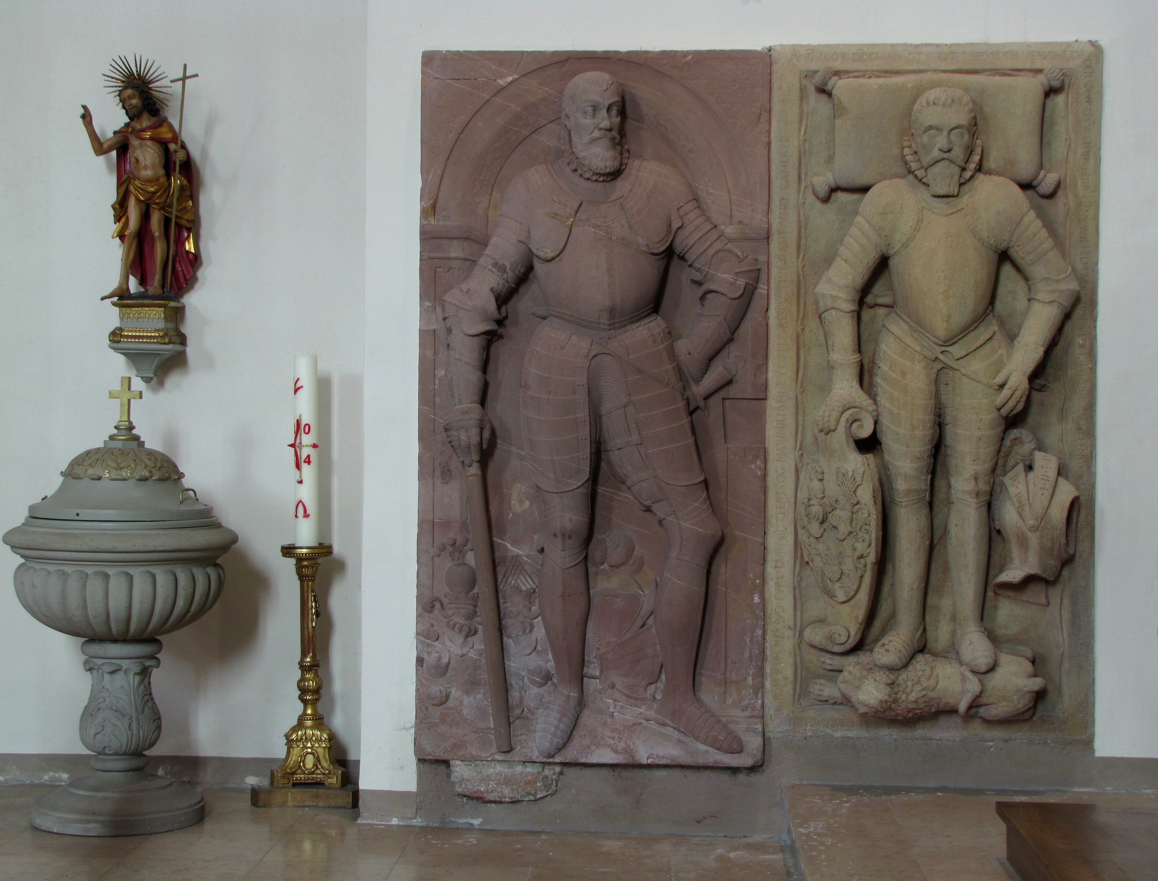 Alsace, Haut-Rhin, Église Notre-Dame-des-Douleurs de Kientzheim (IA68004077). Statue "Christ Glorieux" (XVIIIe): This object is classé Monument Historique in the base Palissy, database of the French furniture patrimony of the French ministry of culture, under the references PM68000191 and IM68006893. Fonts baptismaux (XVIIIe): Dalle funéraire de Lazare de Schwendi († 1583): This object is classé Monument Historique in the base Palissy, database of the French furniture patrimony of the French ministry of culture, under the references PM68000189 and IM68007894. Dalle funéraire de Guillaume de Schwendi († 1609): This object is classé Monument Historique in the base Palissy, database of the French furniture patrimony of the French ministry of culture, under the references PM68000190 and IM68007895.